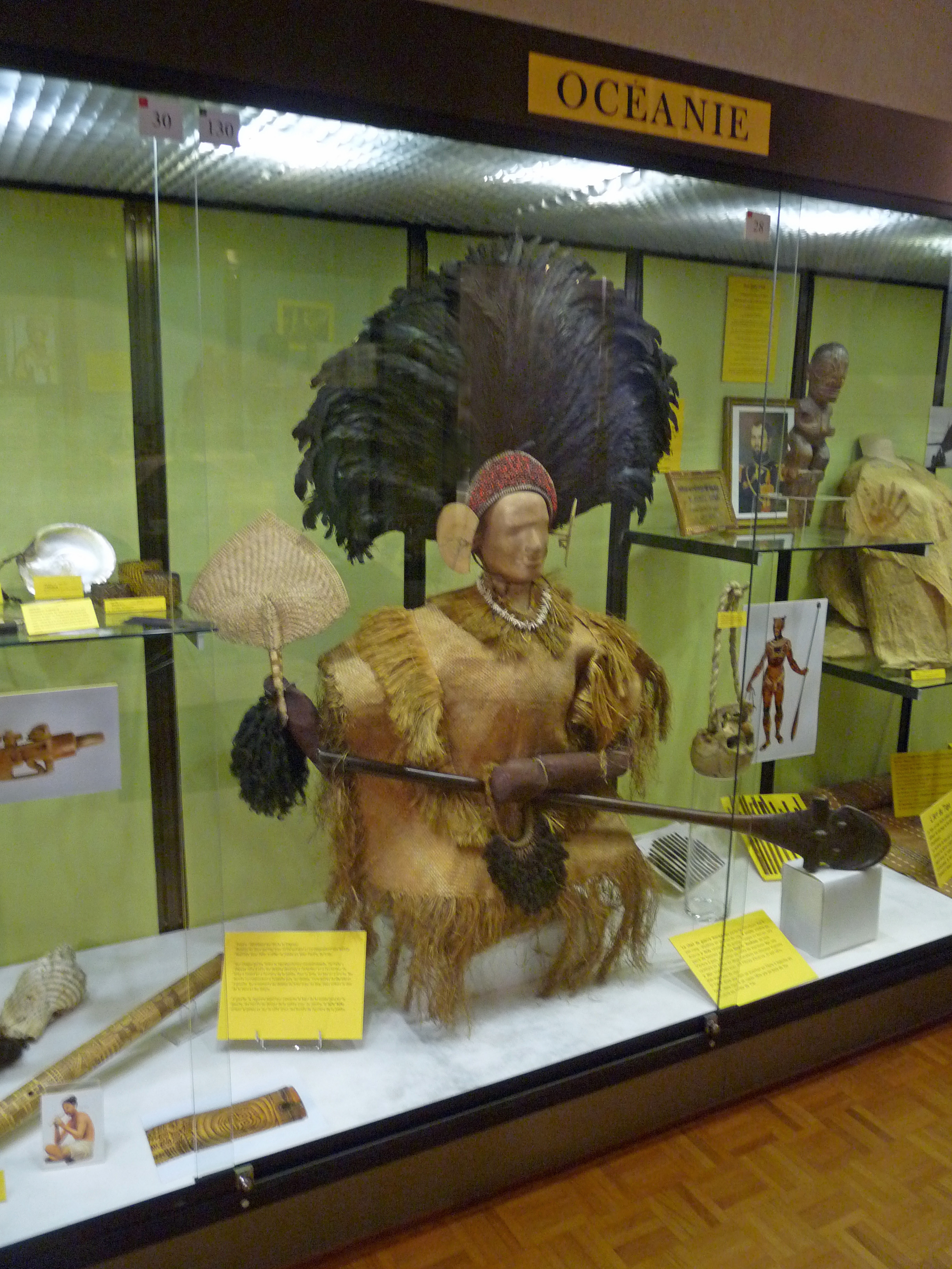 Chef de guerre marquisien portant les attributs dûs à son rang. Musée d'histoire naturelle et d'ethnographie de Colmar